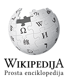 Wikipedia logo 2.0 (da)